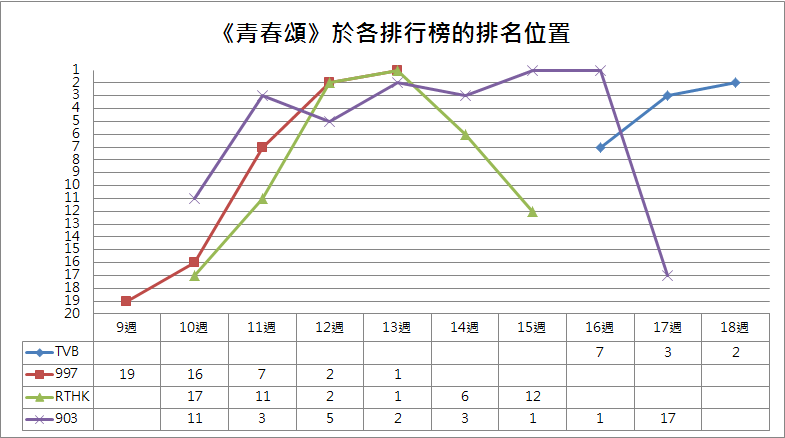 中文（香港）: 歌曲《青春頌》於各流行榜的排名位置